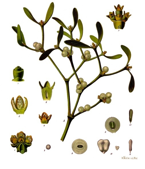 Weiße Mistel. A Zweig der weiblichen Pflanze mit Blüthen und Früchten, natürl. Grösse; 1 männlicher Blüthenstand vergrössert; 2 männliche Blüthe, desgl.; 3 dieselbe im Längsschnitt, desgl.; 4 Pollen, desgl.; 5 weiblicher Blüthenstand desgl.; 6 weibliche Blüthe, zerschnitten, desgl.; 7 dieselbe ohne Perigon, desgl.; 8 Beere im Längsschnitt, desgl.; 9 dieselbe im Querschnitt, desgl.; 10 Same, natürl. Grösse und vergrössert; 11 derselbe von der Seite, vergrössert; 12 derselbe von der Seite im Längsschnitt, desgl.